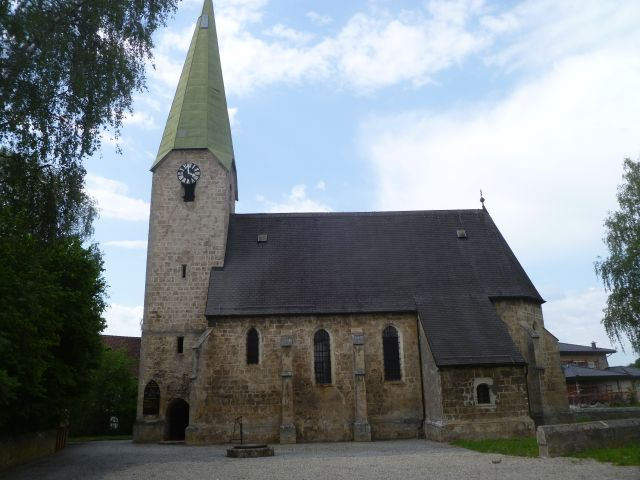 Kath. Filialkirche hl. Georg und Kirchhof mit Ummauerung